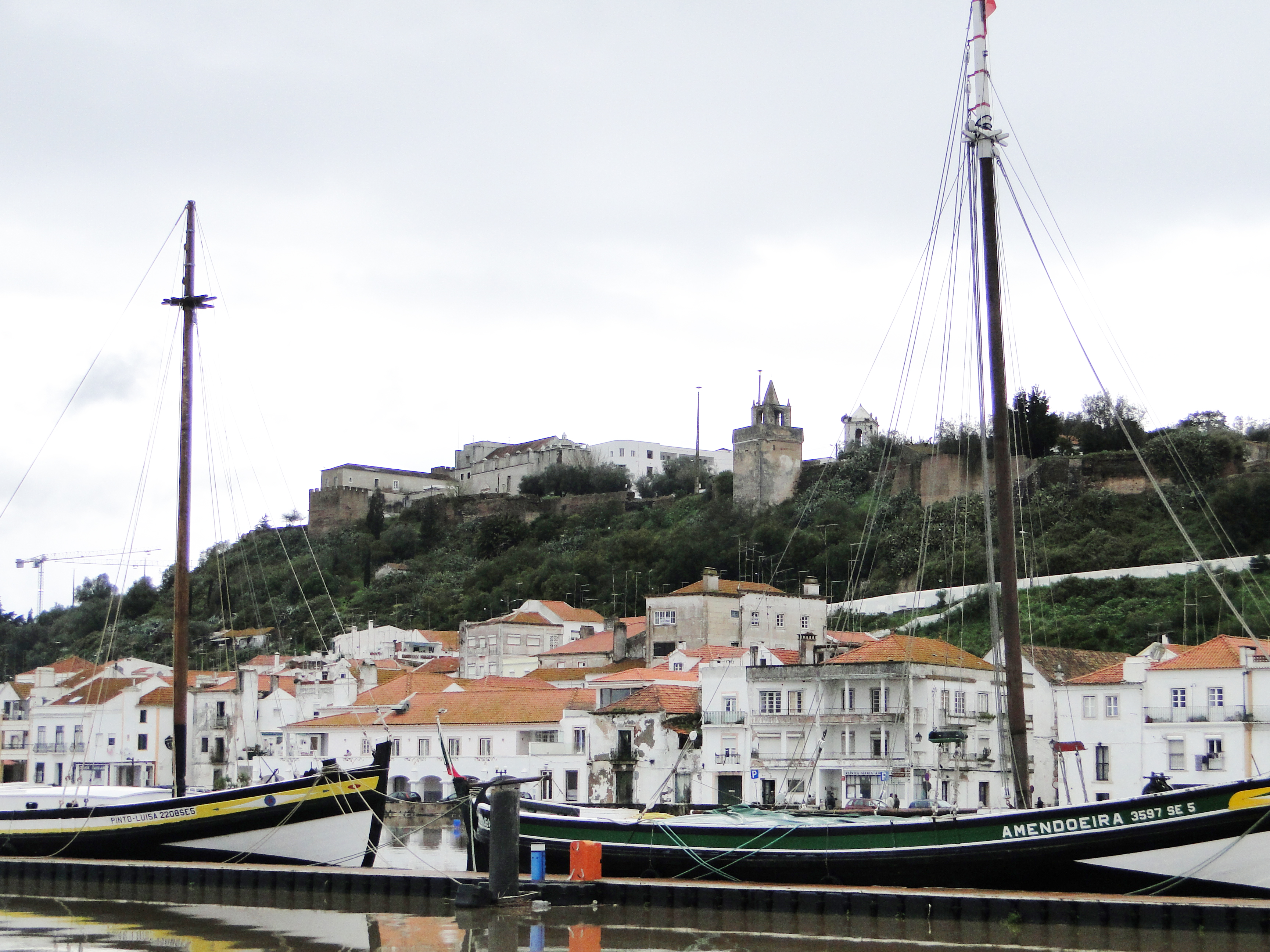 Castelo de Alcacer do sal , transformado agora em Pousada